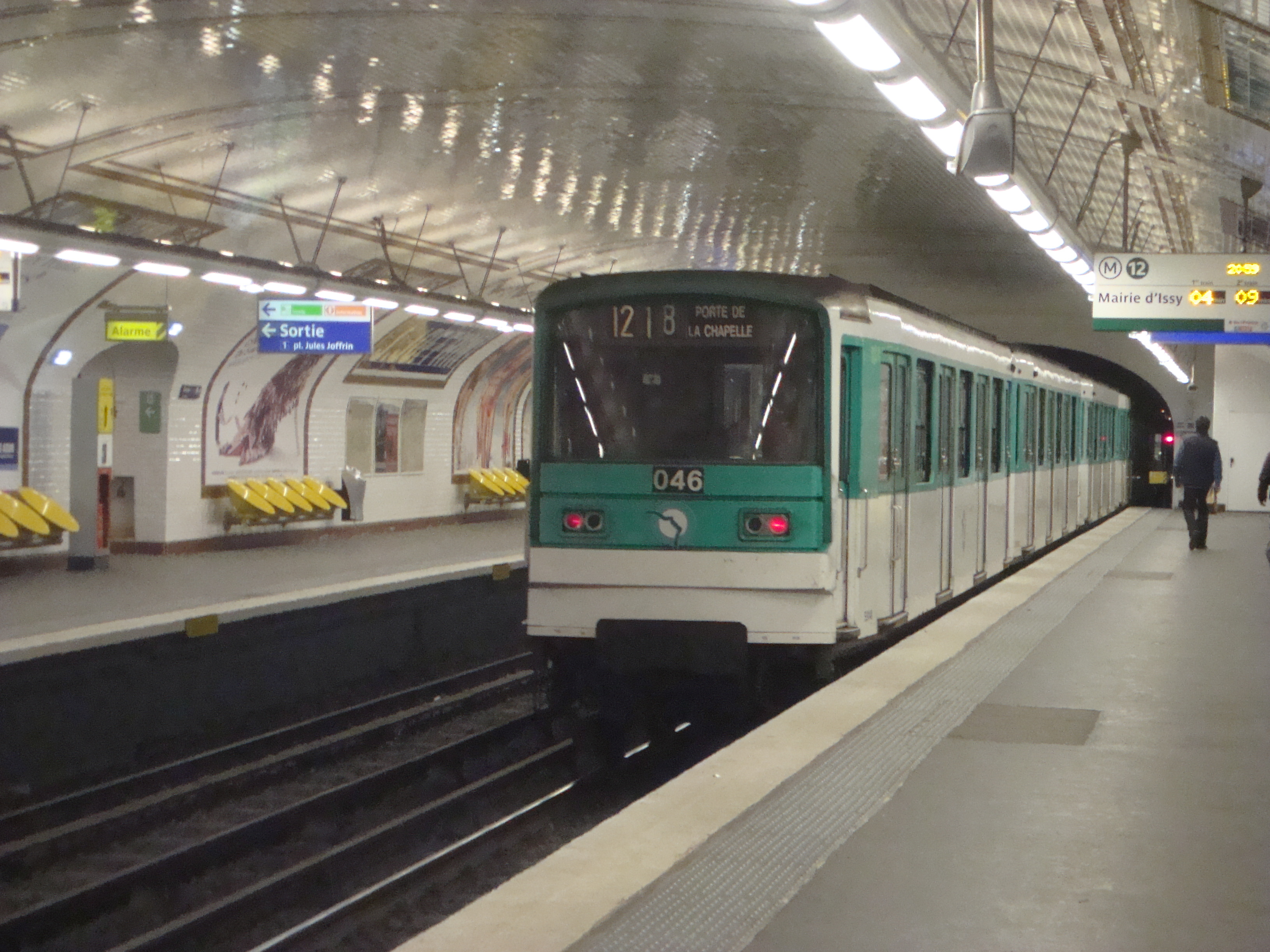 Une rame quitte la station Jules Joffrin.